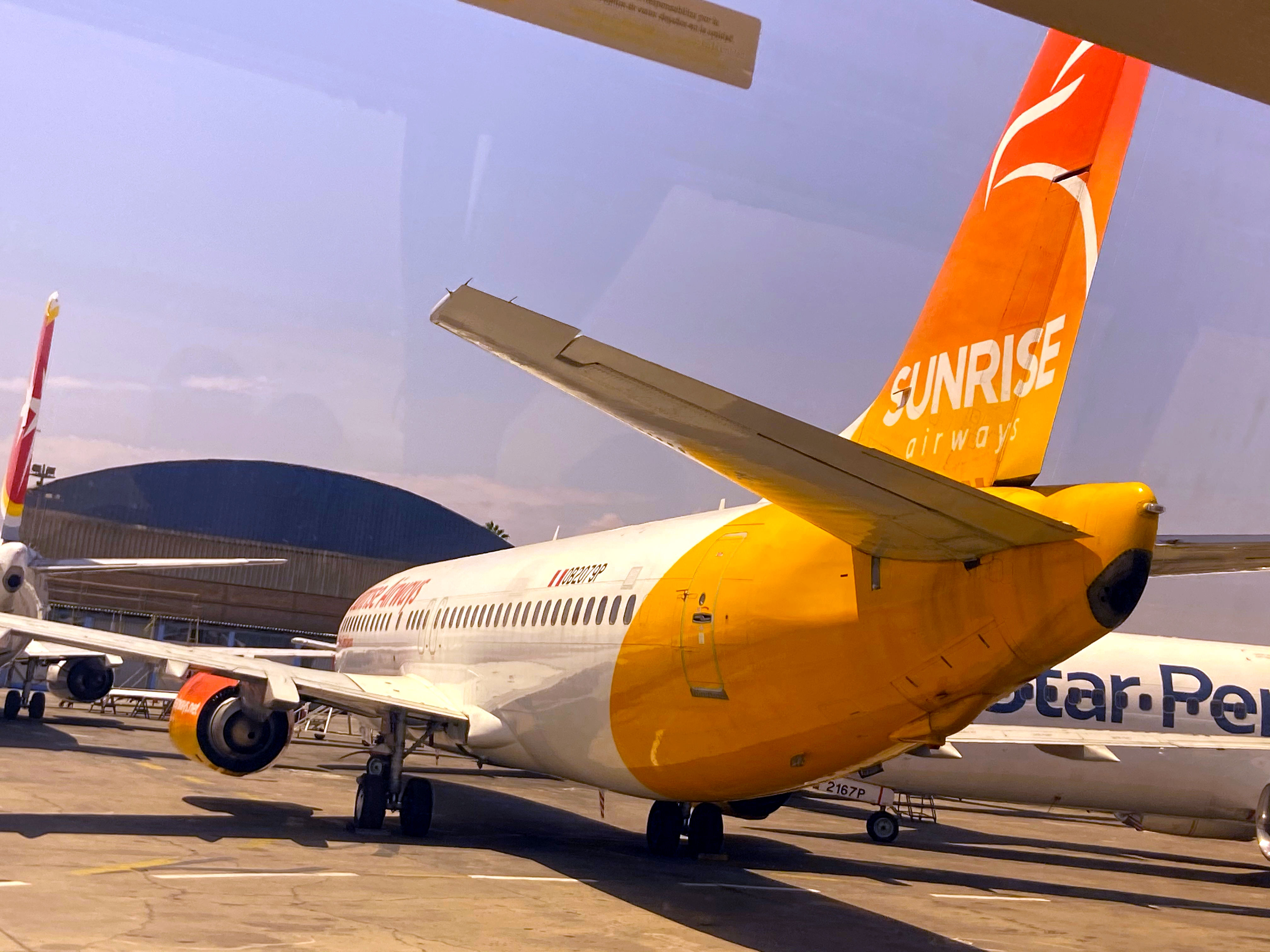 Sunrise Airways Boeing 737-3WL (operated by StarPerú)